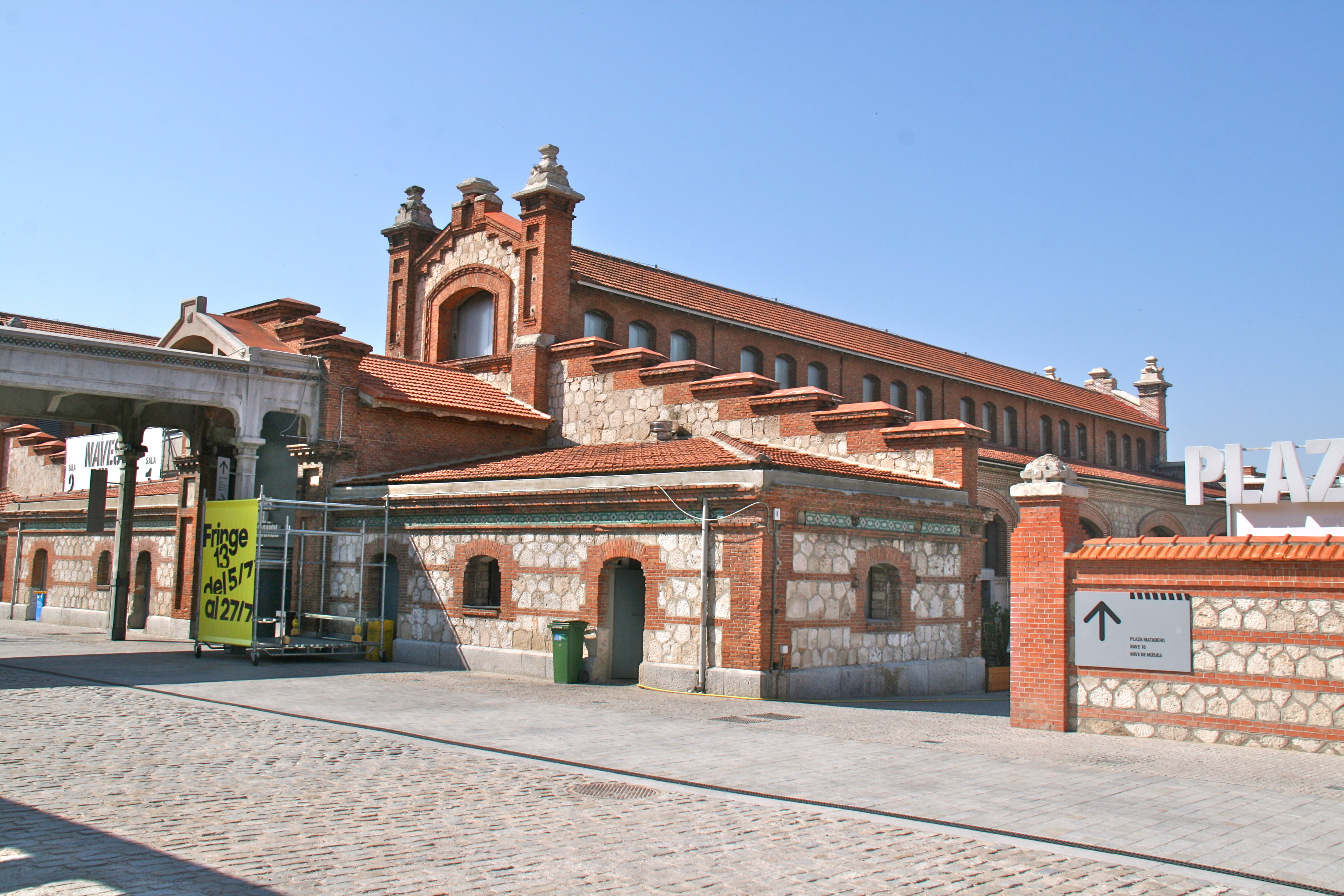 Halle 12 - Schlachthof von Madrid